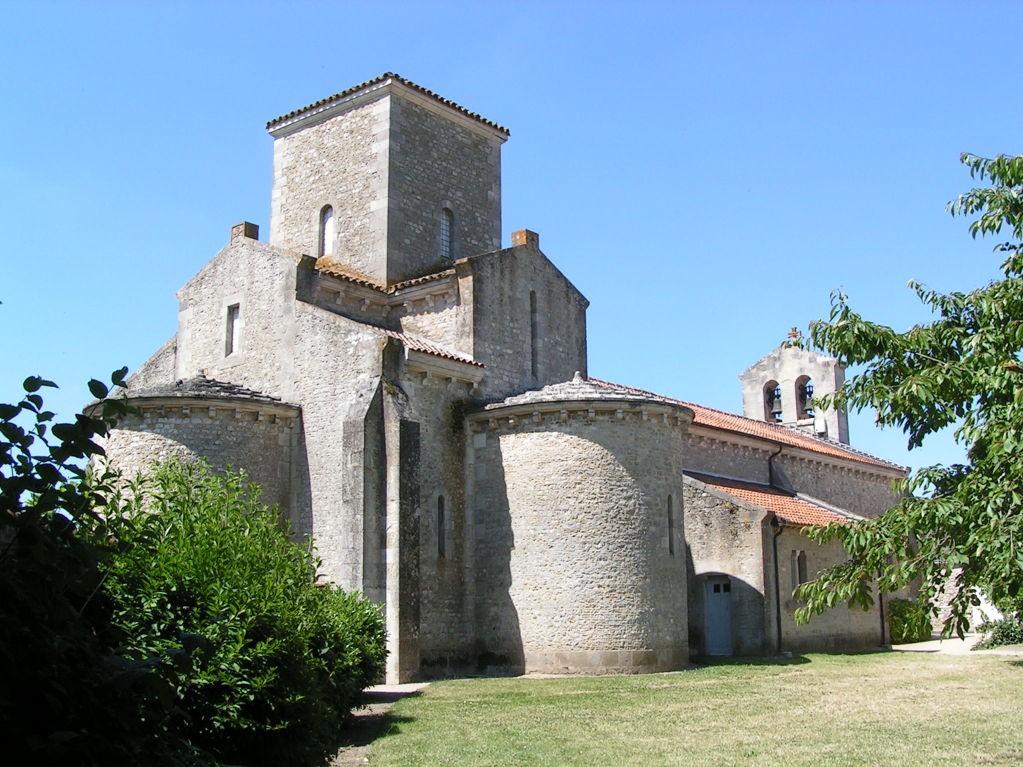 Église de la Très-Sainte-Trinité de Germigny-des-Prés, Monument historique, Loiret, Centre, France .